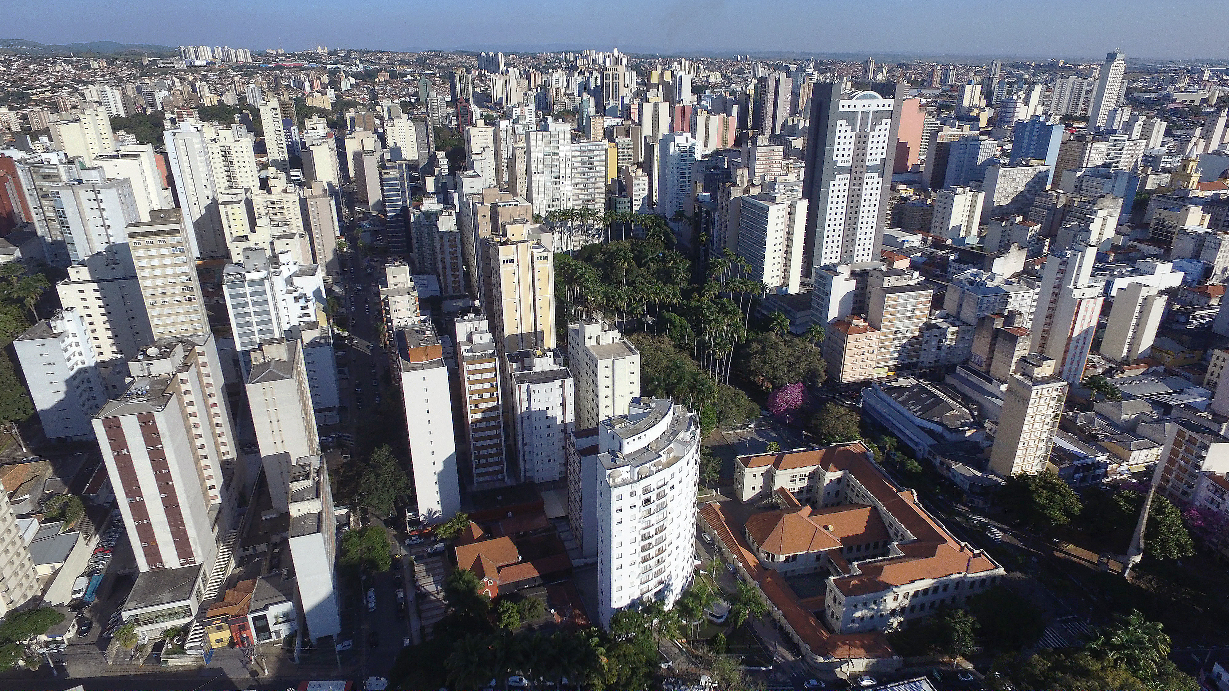 Fotos Centro de Campinas Fotógrafo Carlos Bassan